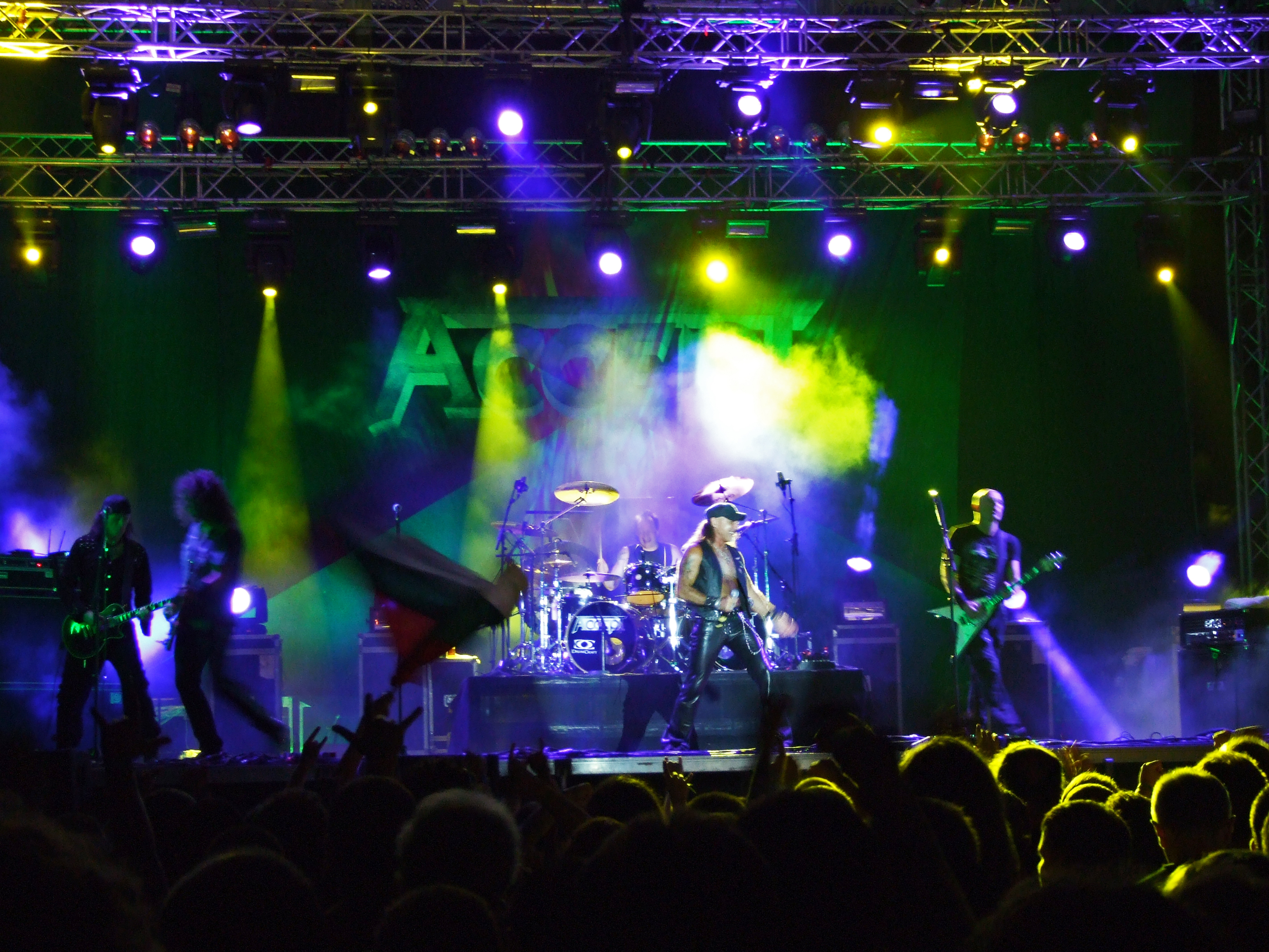 Accept at Kavarna Rock Fest - 25 July 2010 - Kavarna, Bulgaria